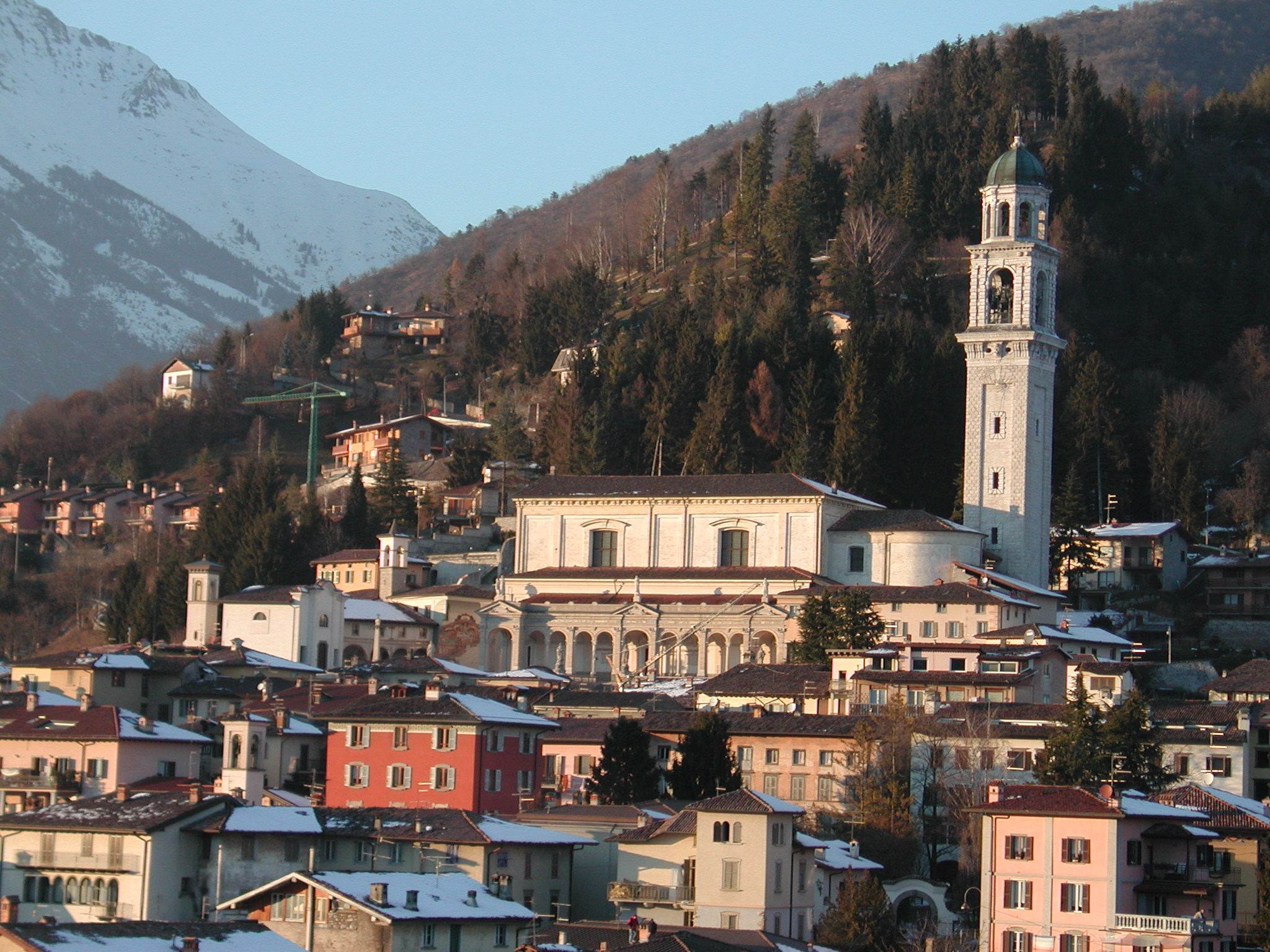 Clusone, provincia di Bergamo, Italy made by Paolo da Reggio